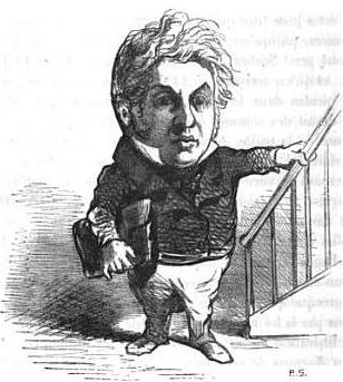 Caricature du ministre Michel Goudchaux, par Cham.